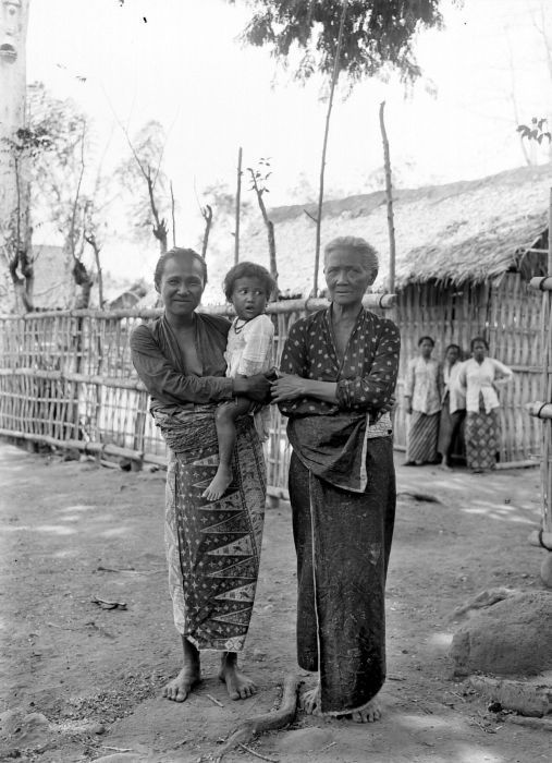 Negatief. Portret van drie generaties vrouwen in Blambangan, Oost-Java